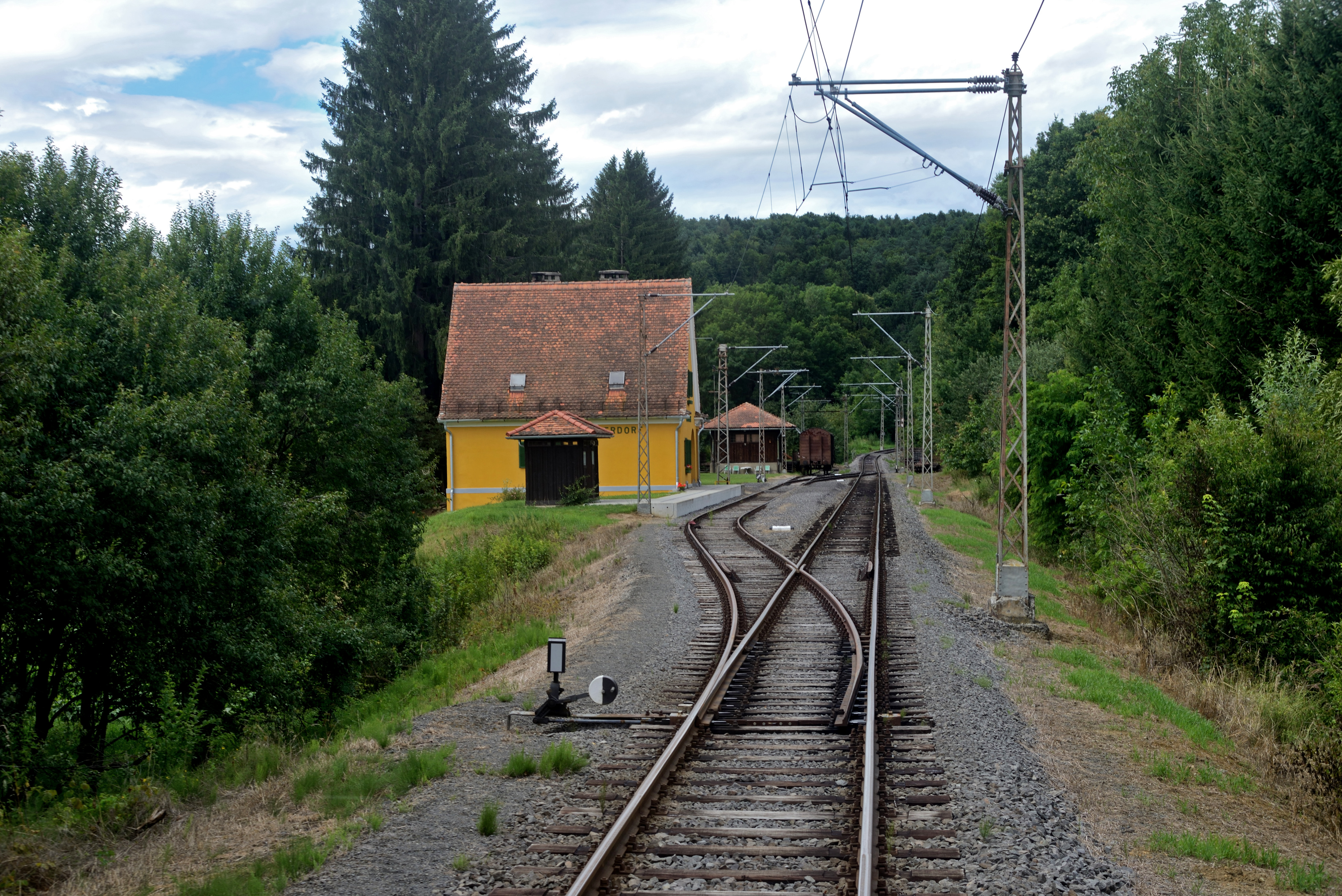 Bahnhof Maierdorf an der Gleichenberger Bahn